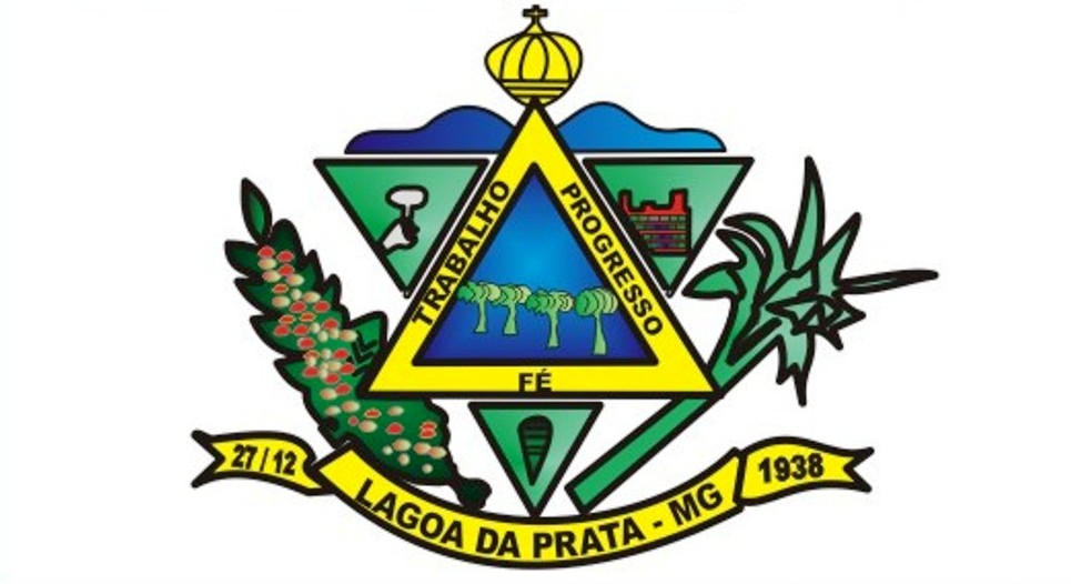 Bandeira